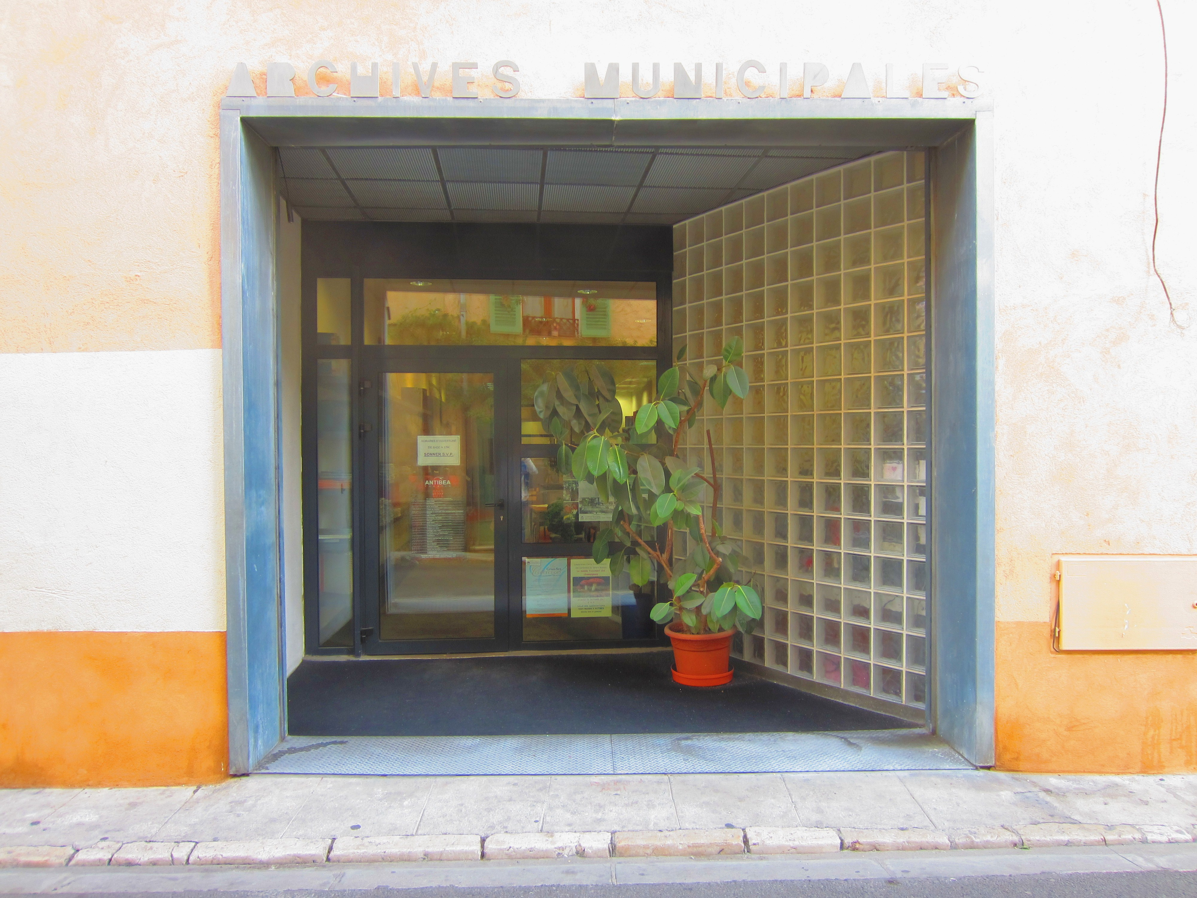 Archives municipales Antibes